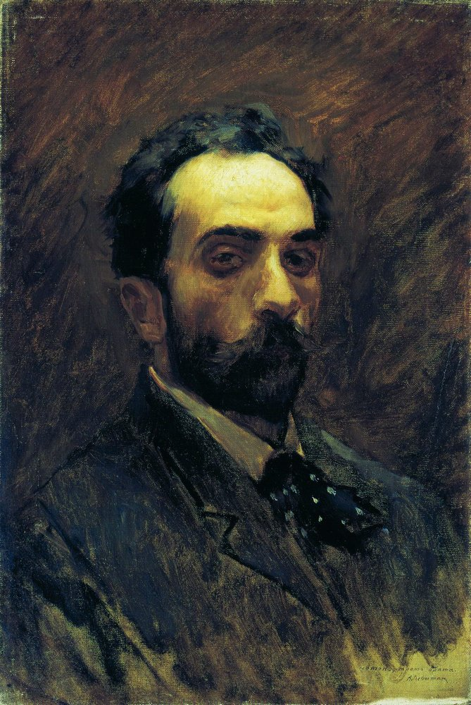 "Автопортрет"1890-е Холст, масло 58 x 39 Государственная Третьяковская галерея Москва...